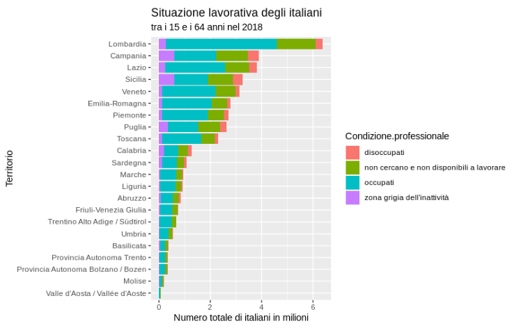 file realizzato con RStudio con dati Istat